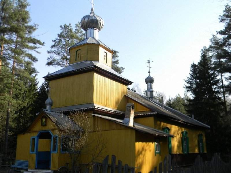 Глуша. Музей рамёстваў. Царква з в. Вуглы